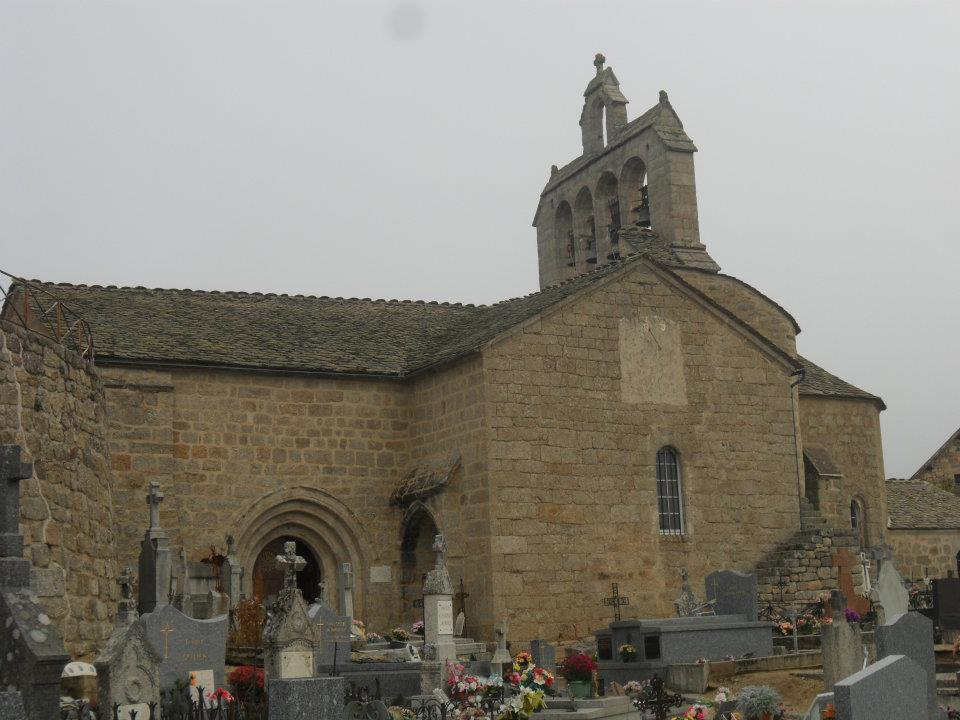 Eglise paroissiale Saint-Pierre de Fontans (Lozère, France)